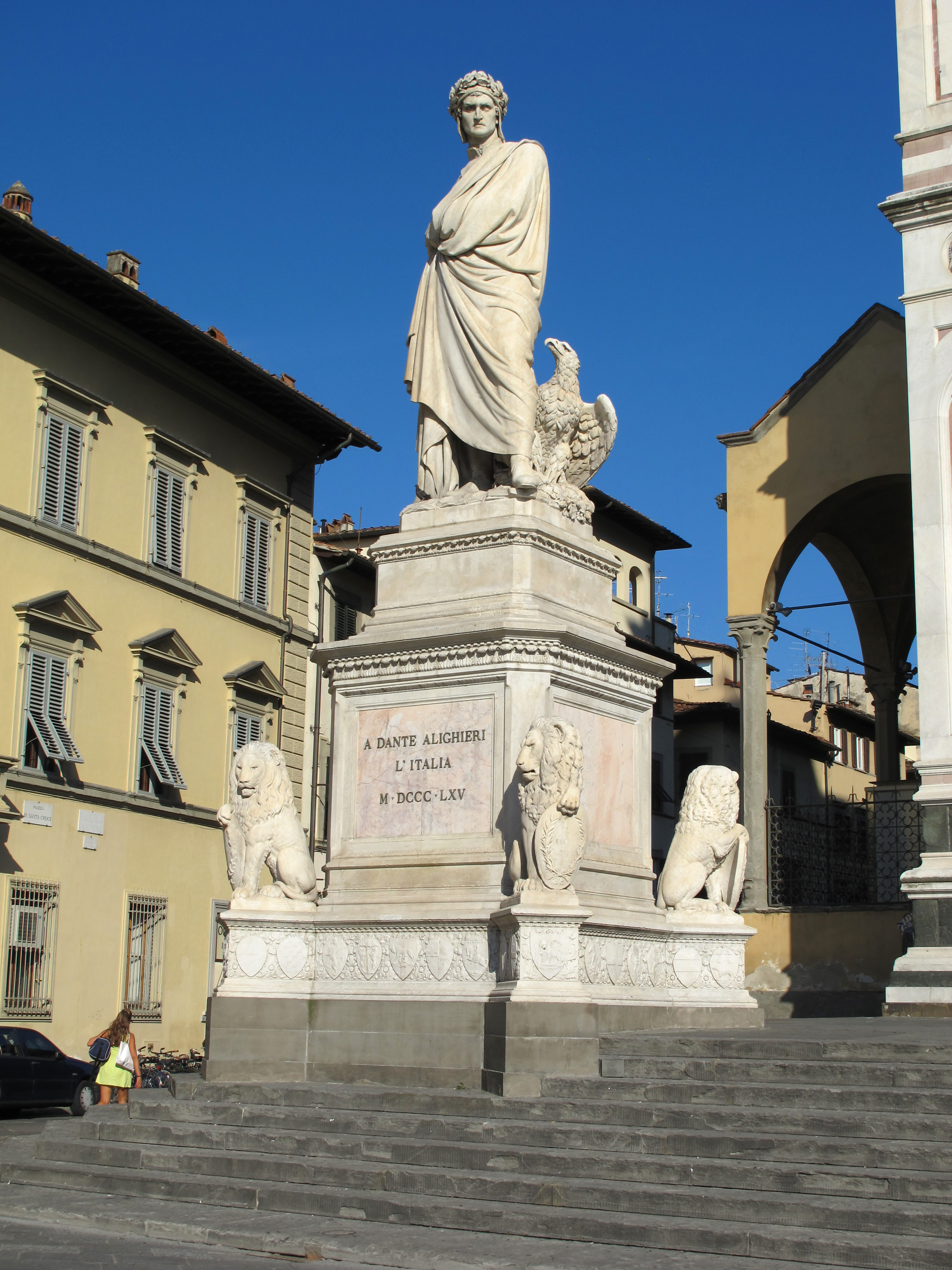 Piazza Santa Croce, Firenze